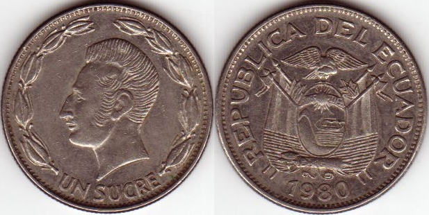 Ecuadorian 1 Sucres coin